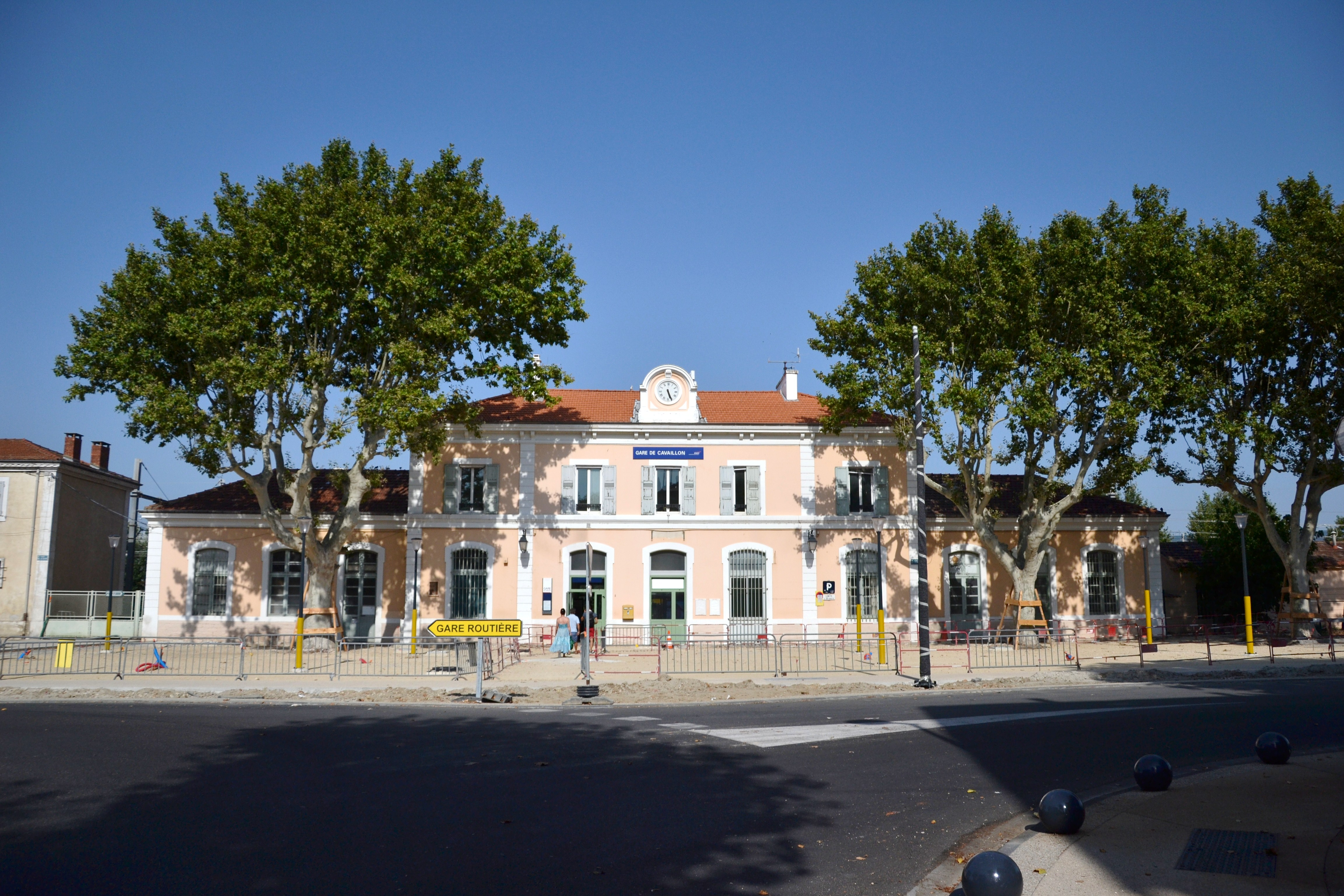 Façade de la gare de Cavaillon